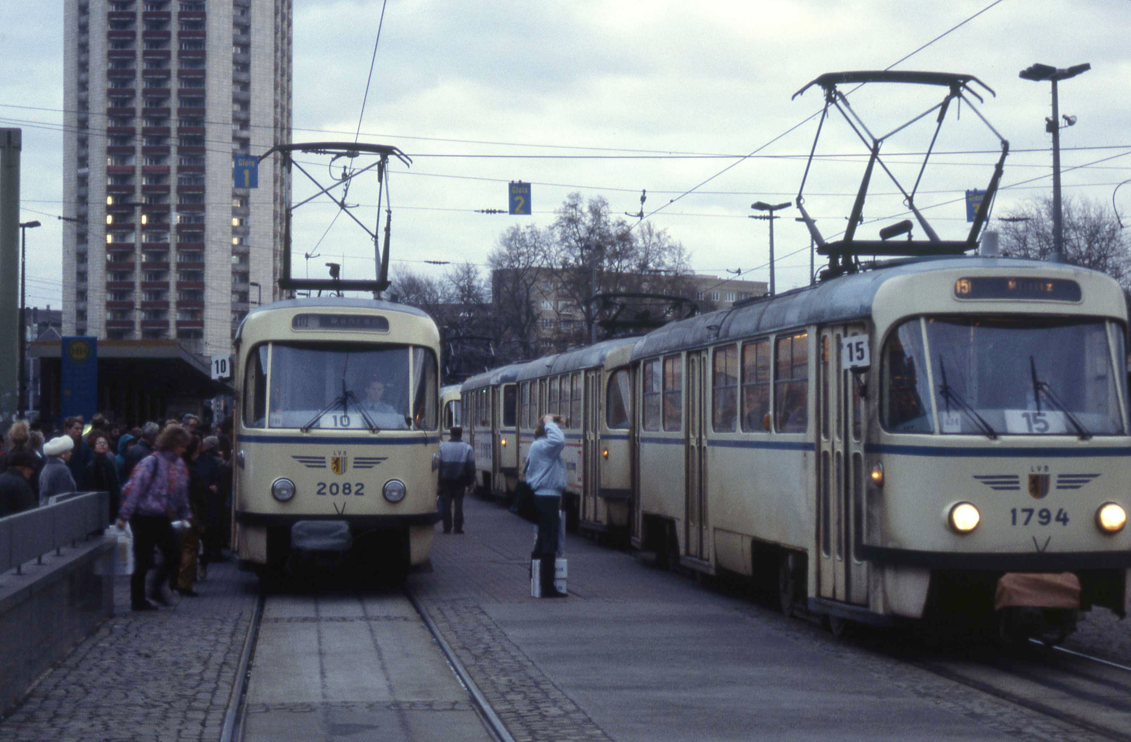 Trams in 1991 bij het Hauptbahnhof van Leipzig